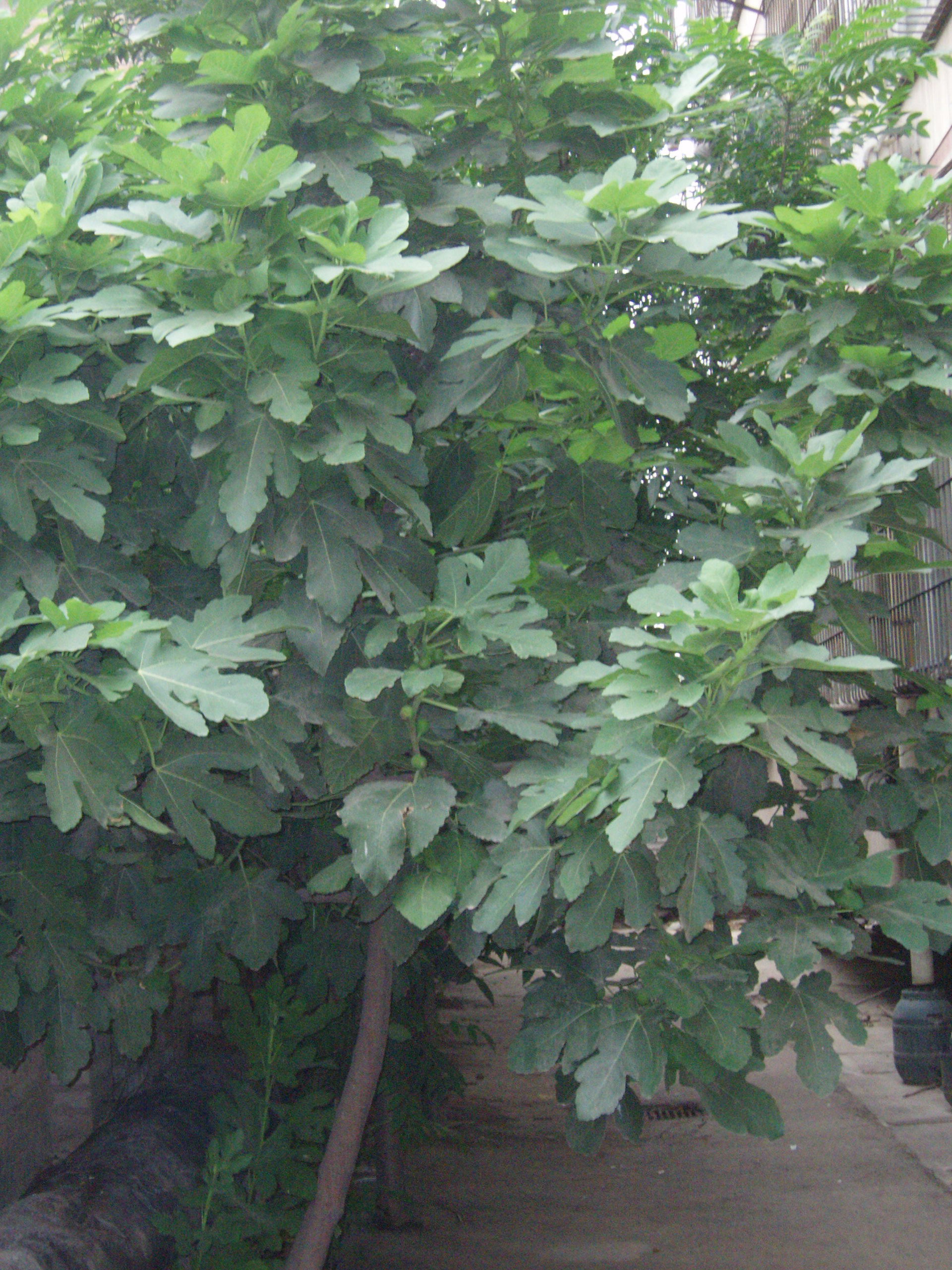 Fig tree